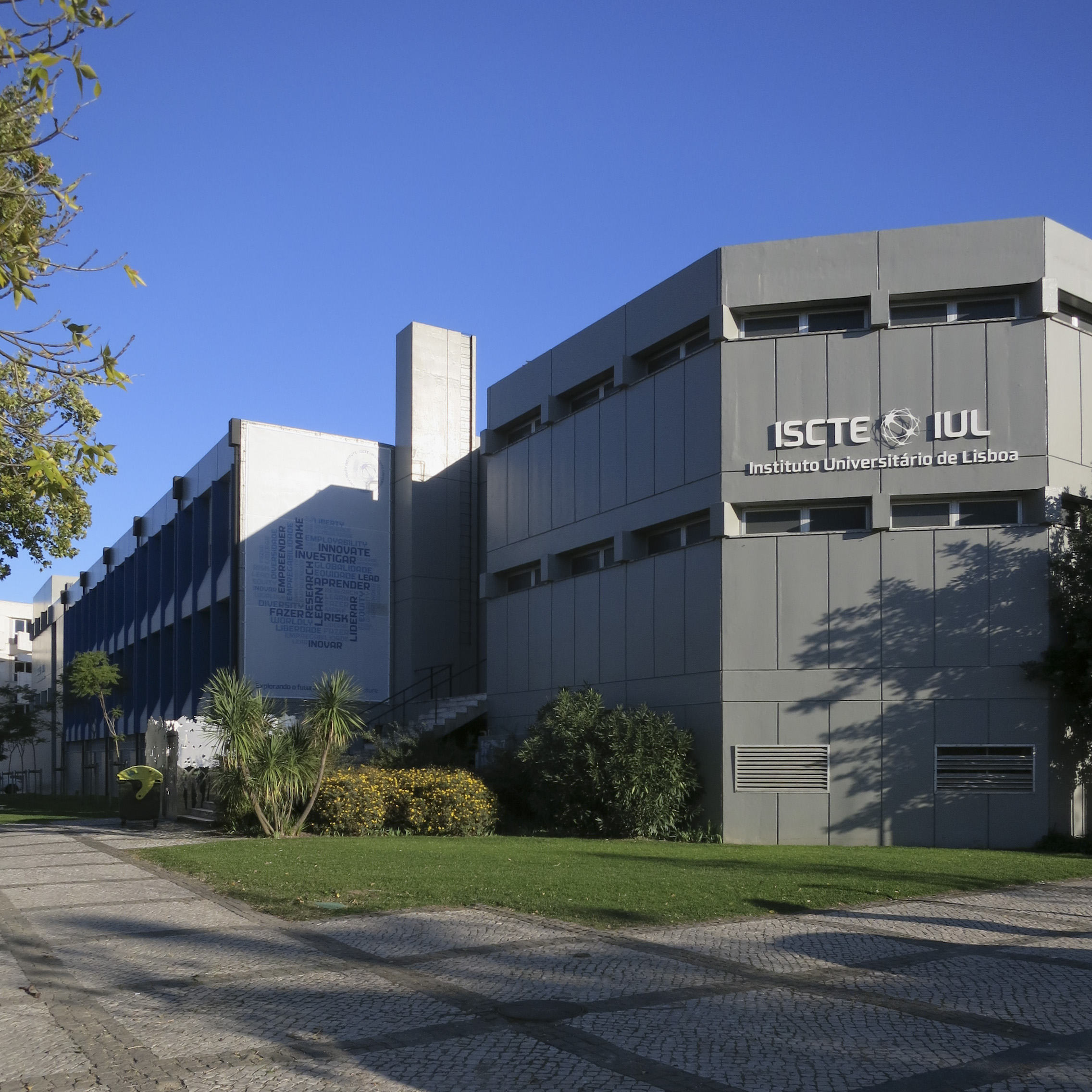 Raul Hestnes Ferreira, ISCTE, Lisboa